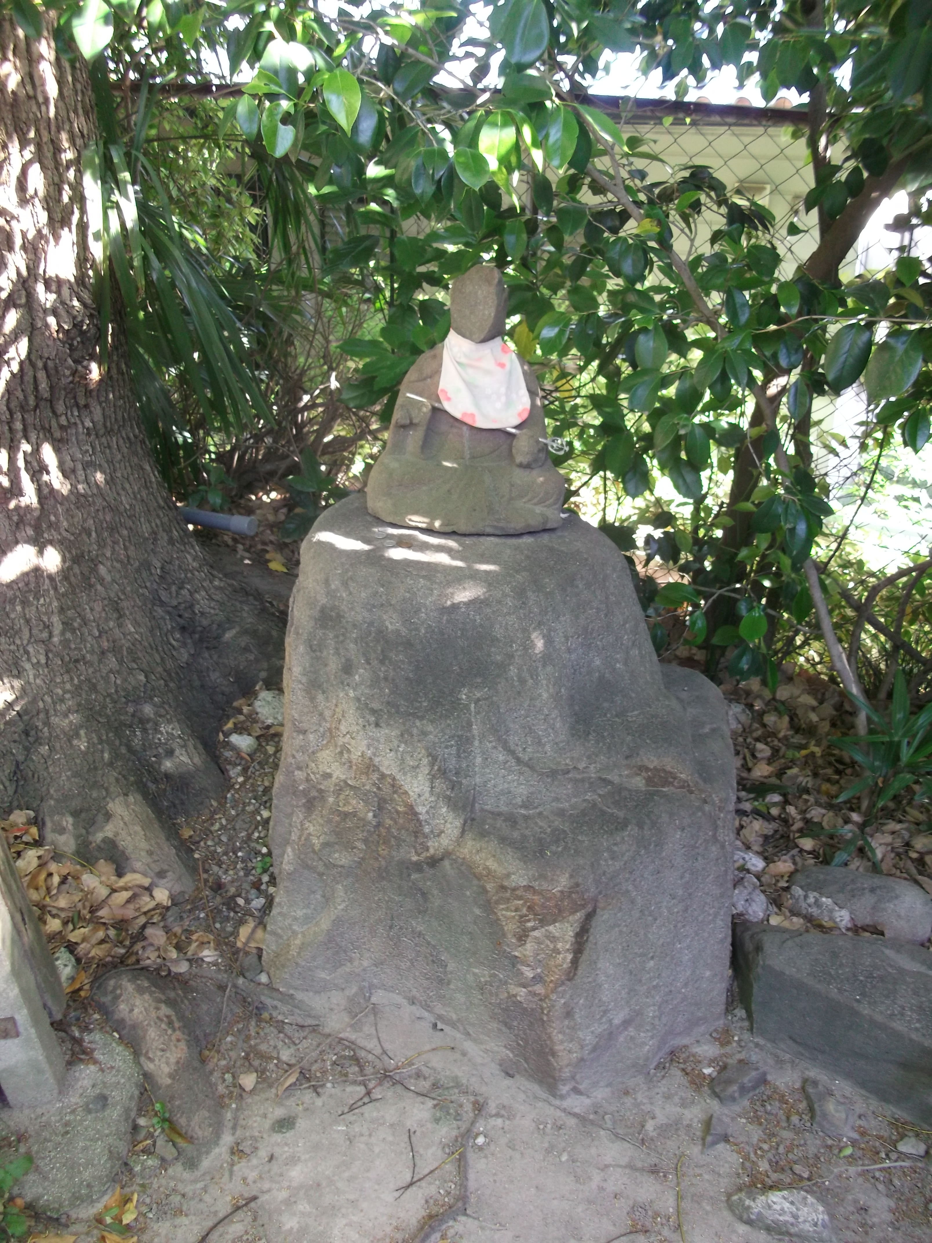 名古屋市瑞穂区井戸田町龍泉寺境内にある歯痛地蔵尊を北側から写す